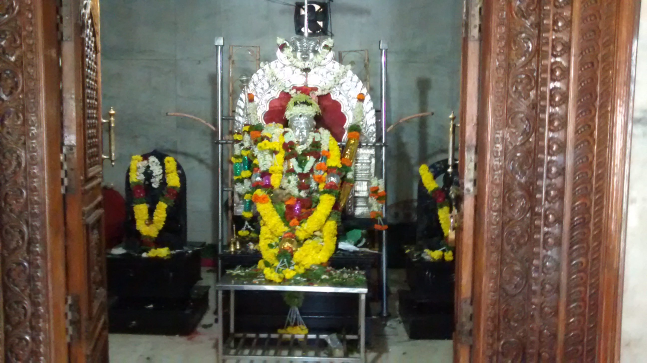 ಕನ್ನಡ: Narada Muni